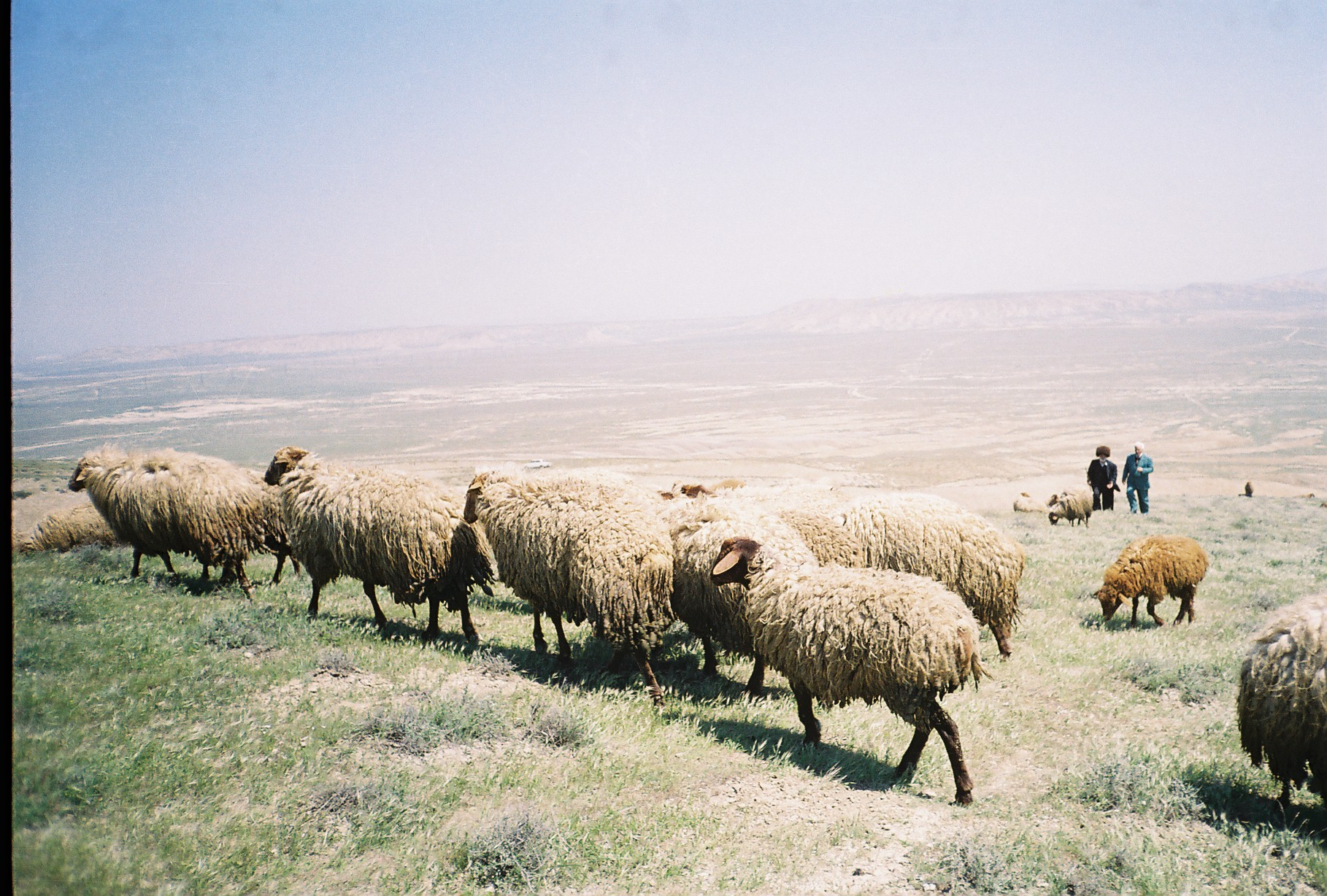 2007-ci ildə təsdiq olunmuş yeni Abşeron qoyun cinsi.